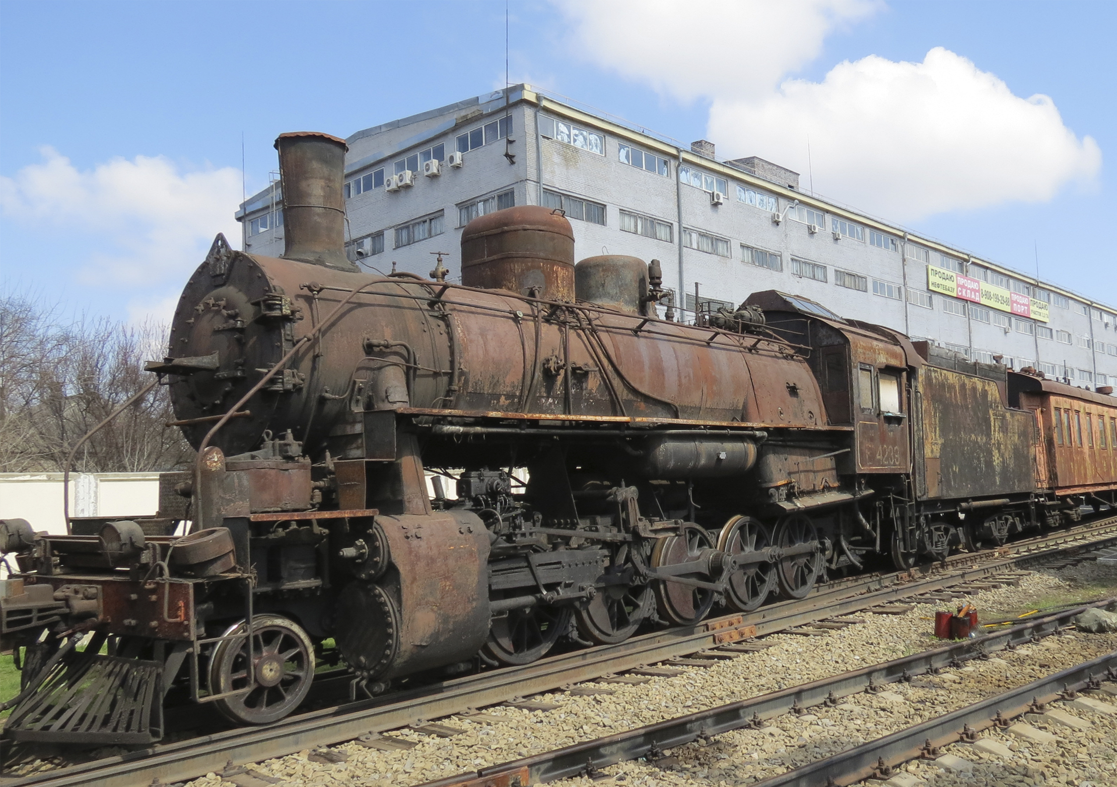 Паровоз построен в 1945 году заводом «АЛКО», США